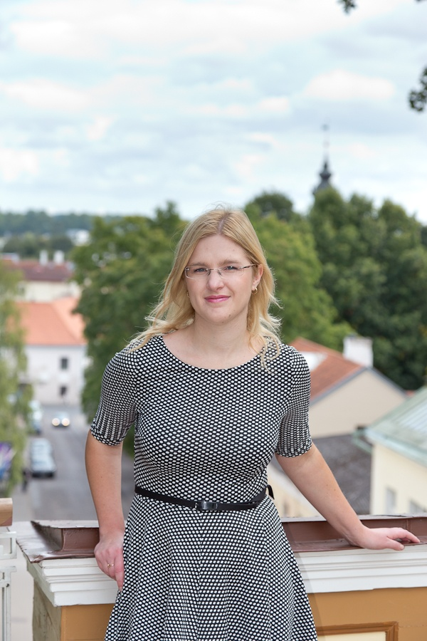 Egle Pullerits, eesti keeletoimetaja ja publitsist